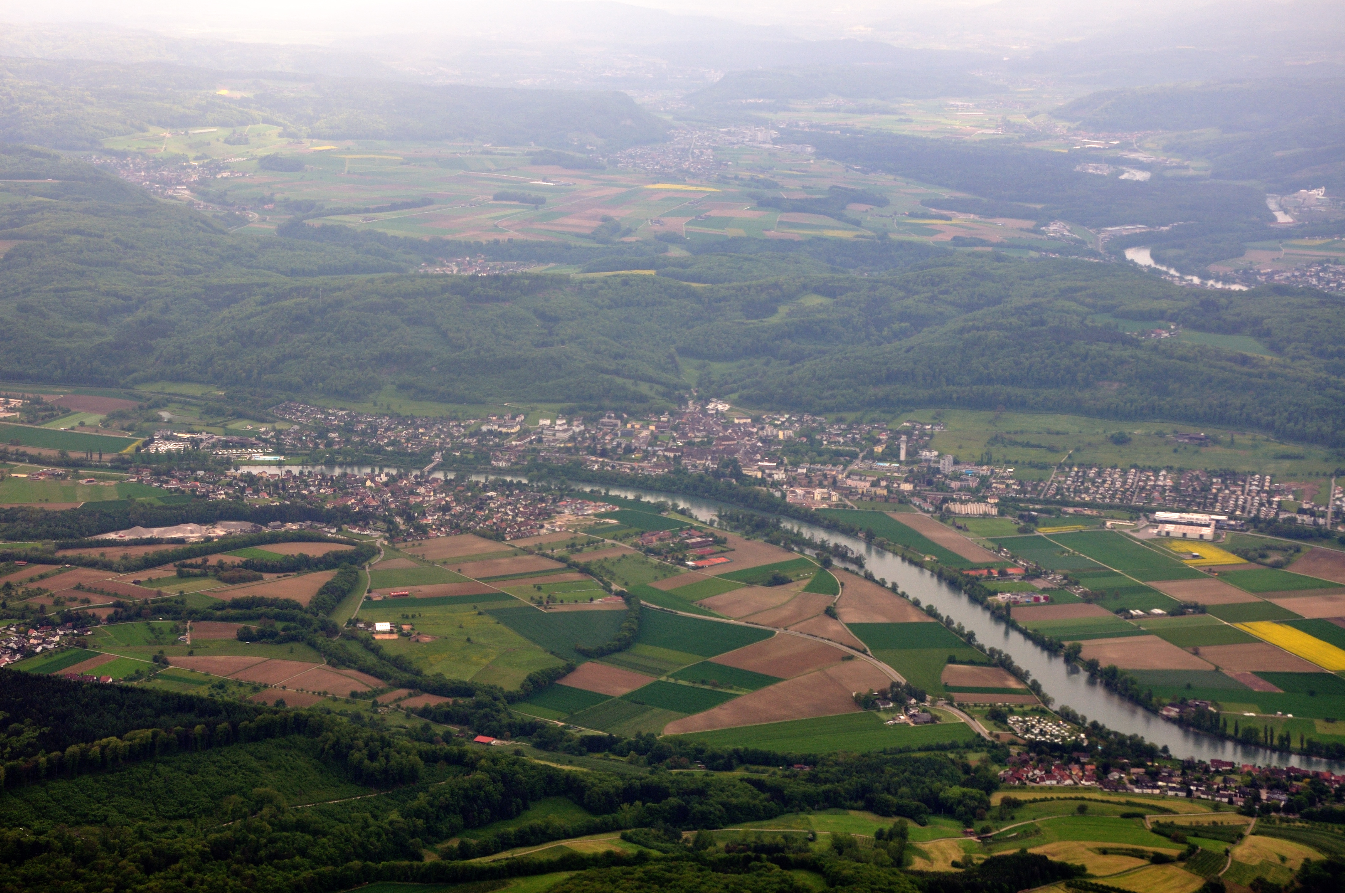 Germany, Baden-Württemberg, aerial view overhead Rheinheim (D) und Bad Zurzach (CH). [Bildbenennung korrigiert].